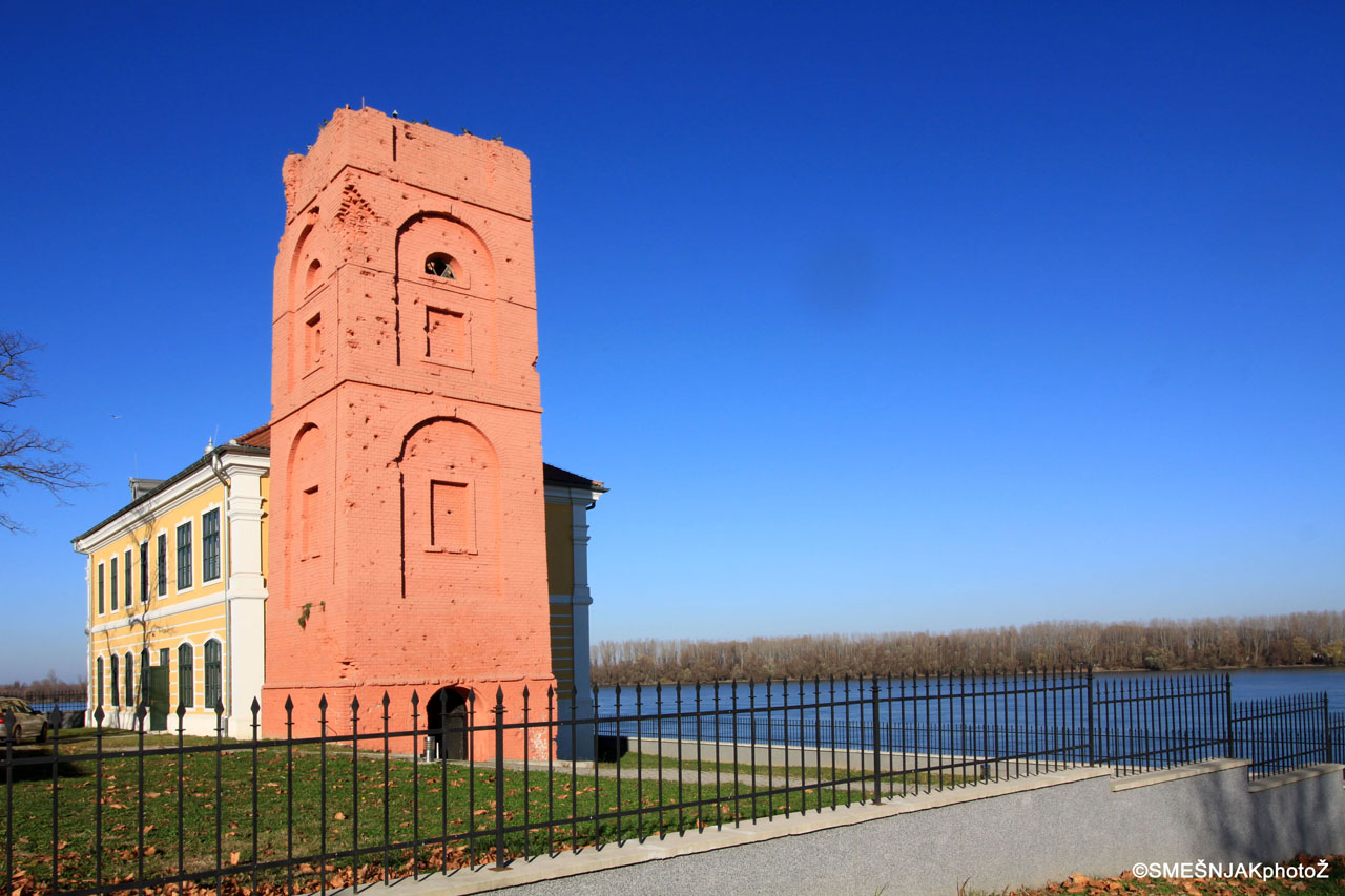 Kompleks vlastelinstva Eltz, Županijska 1, 2, 3, 4, 5 i 7, Gradski muzej Vukovar